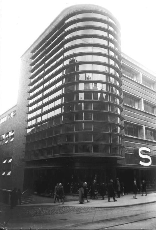 Moderne Hochbau-Architektur! Das Kaufhaus aus Glas! Die interessante Glas-Fassade eines Warenhauses in der Hauptstrasse in Stuttgart nach dem Prinzip, ausgehend Licht, Luft, und Sonne in die Räume zulassen.